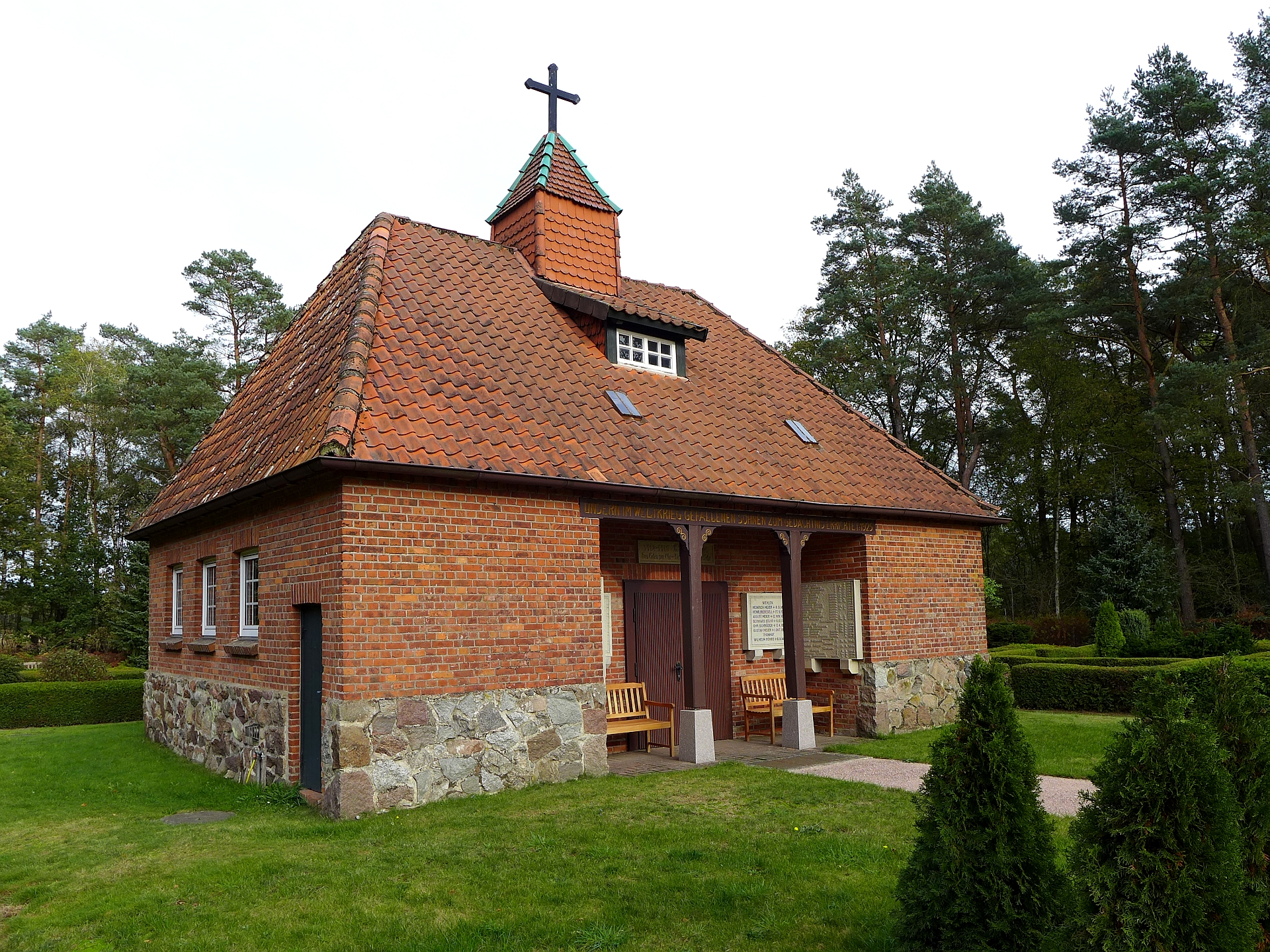 Kapelle, erbaut 1925, auf dem Friedhof von Wesel (Ortsteil von Undeloh).